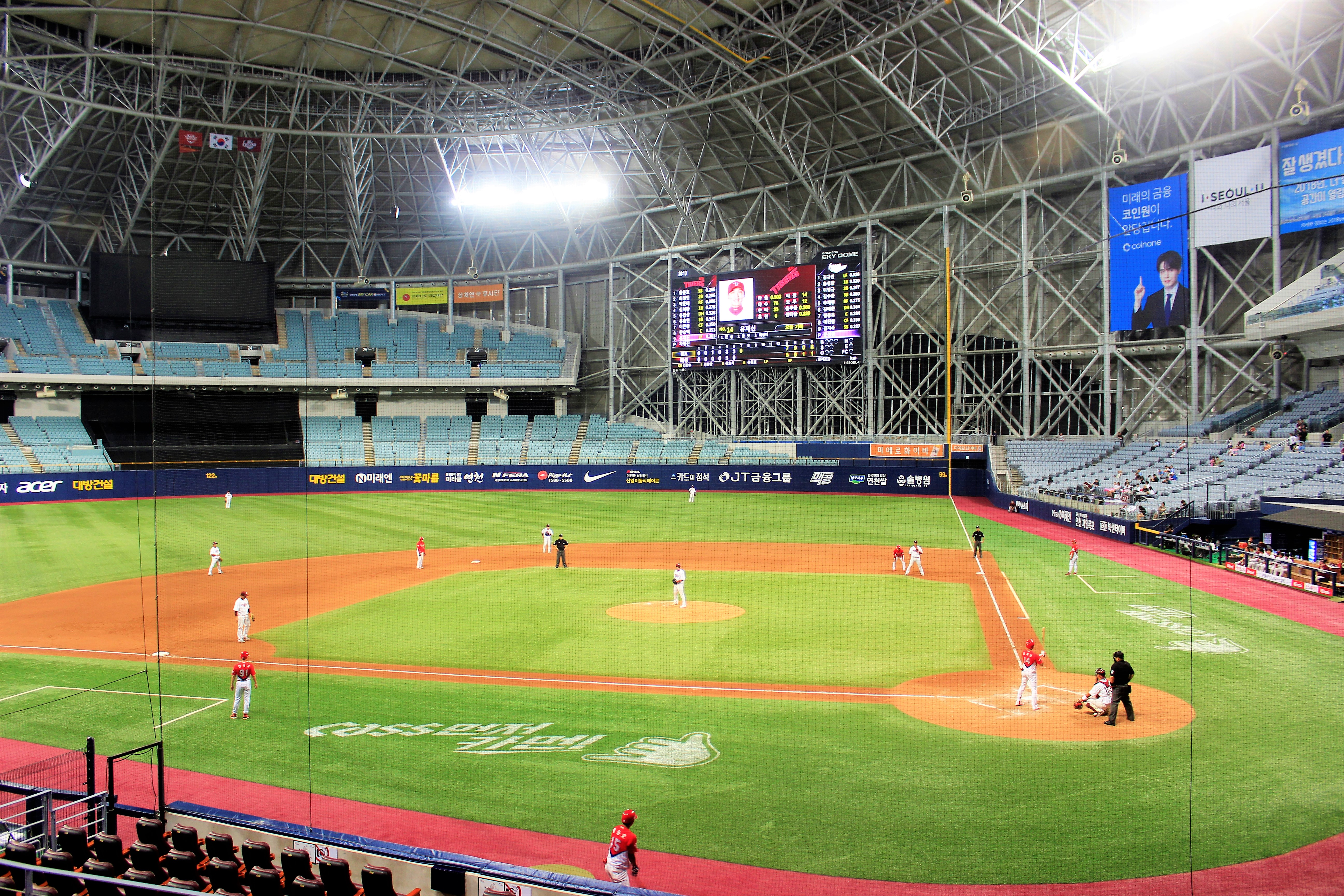 화성 히어로즈와 기아 타이거즈 2군 간의 경기가 2018년 8월 26일 고척 스카이돔에서 펼쳐졌다